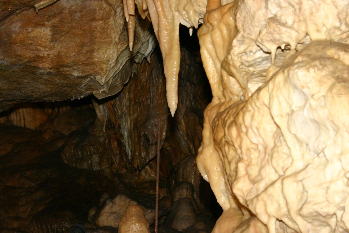 Binghöhle bei Streitberg